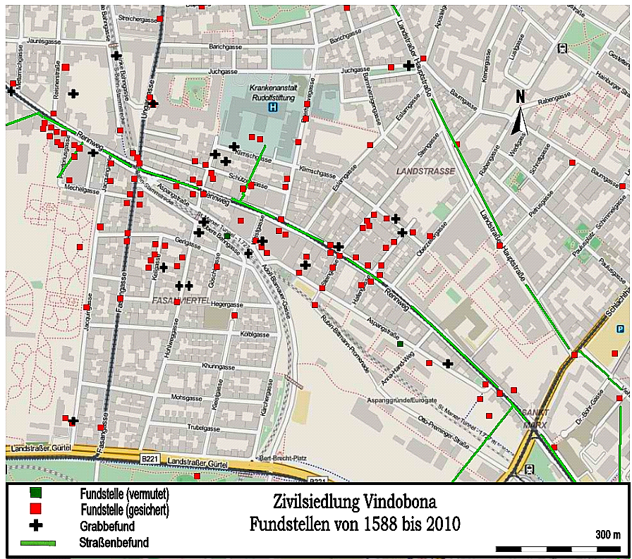 Bereich der Zivilsiedlung (Municipium) von Vindobona, Fundstellen von 1588 bis 2010. Vorlage aus: Karin Fischer-Ausserer (Hrsgb.): Entlang des Rennweges. Die römische Zivilsiedung vom Vindobona, Wien Archäologisch, Band 8, Museen der Stadt Wien - Stadtarchäologie, Wien 2011. Reinhard Pohanka: Das römische Wien, Geschichte Wiens Band I, Pichler Verlag Ed. Wien, 1997, S. 21